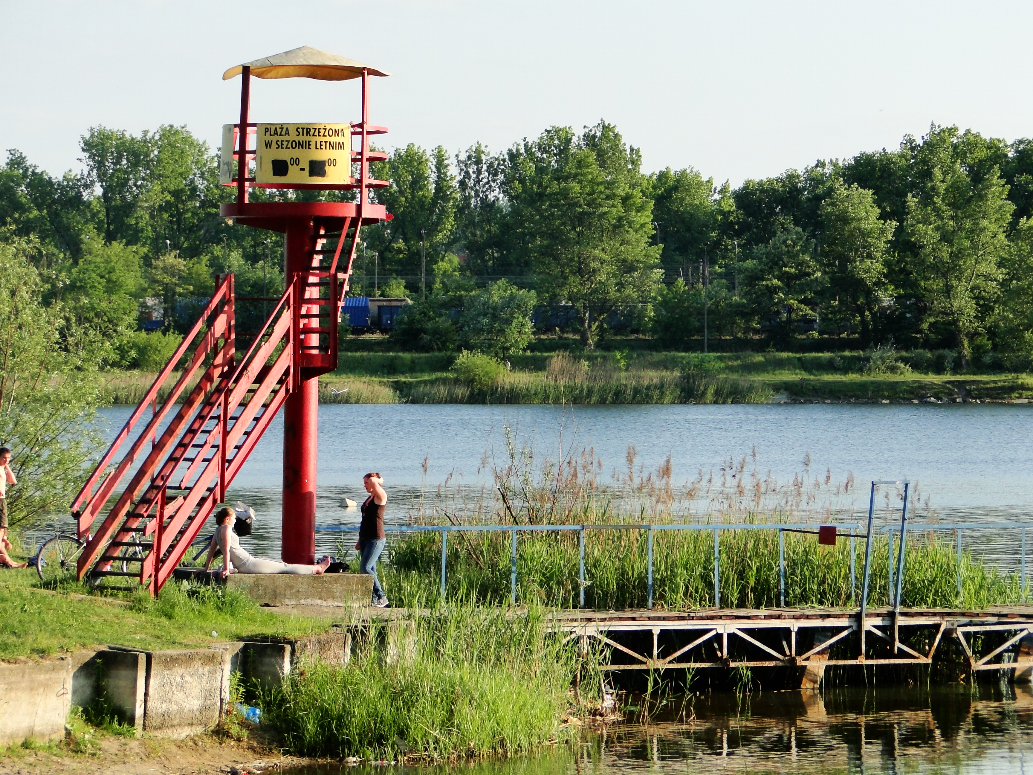 Pomost na krakowskich Bagrach